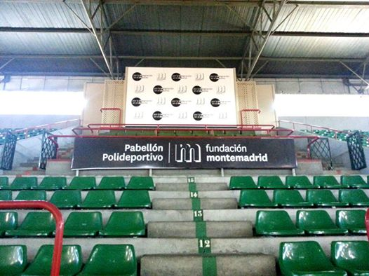 palco del pabellon